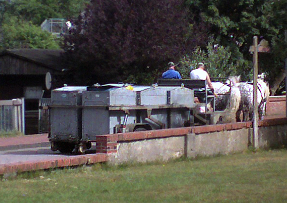 Müllabfuhr mit Pferdewagen auf der grundsätzlich autofreien ostfriesischen Nordseeinsel Juist